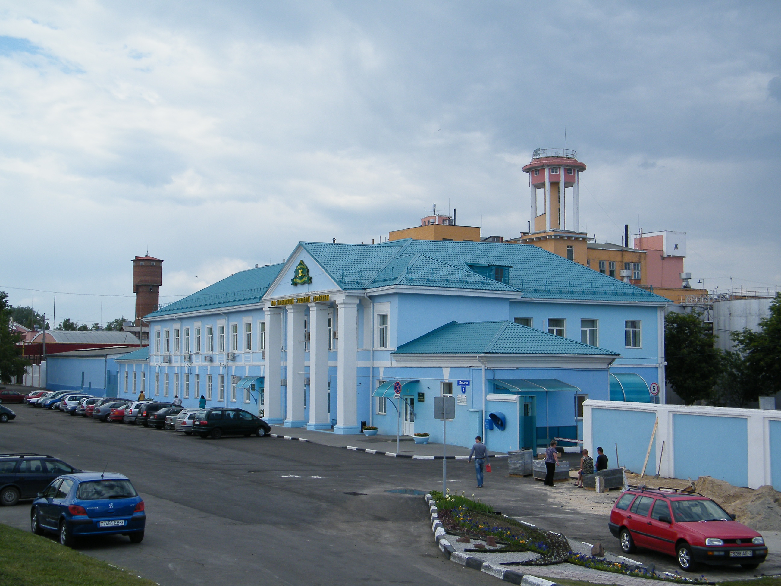 Жирокомбинат